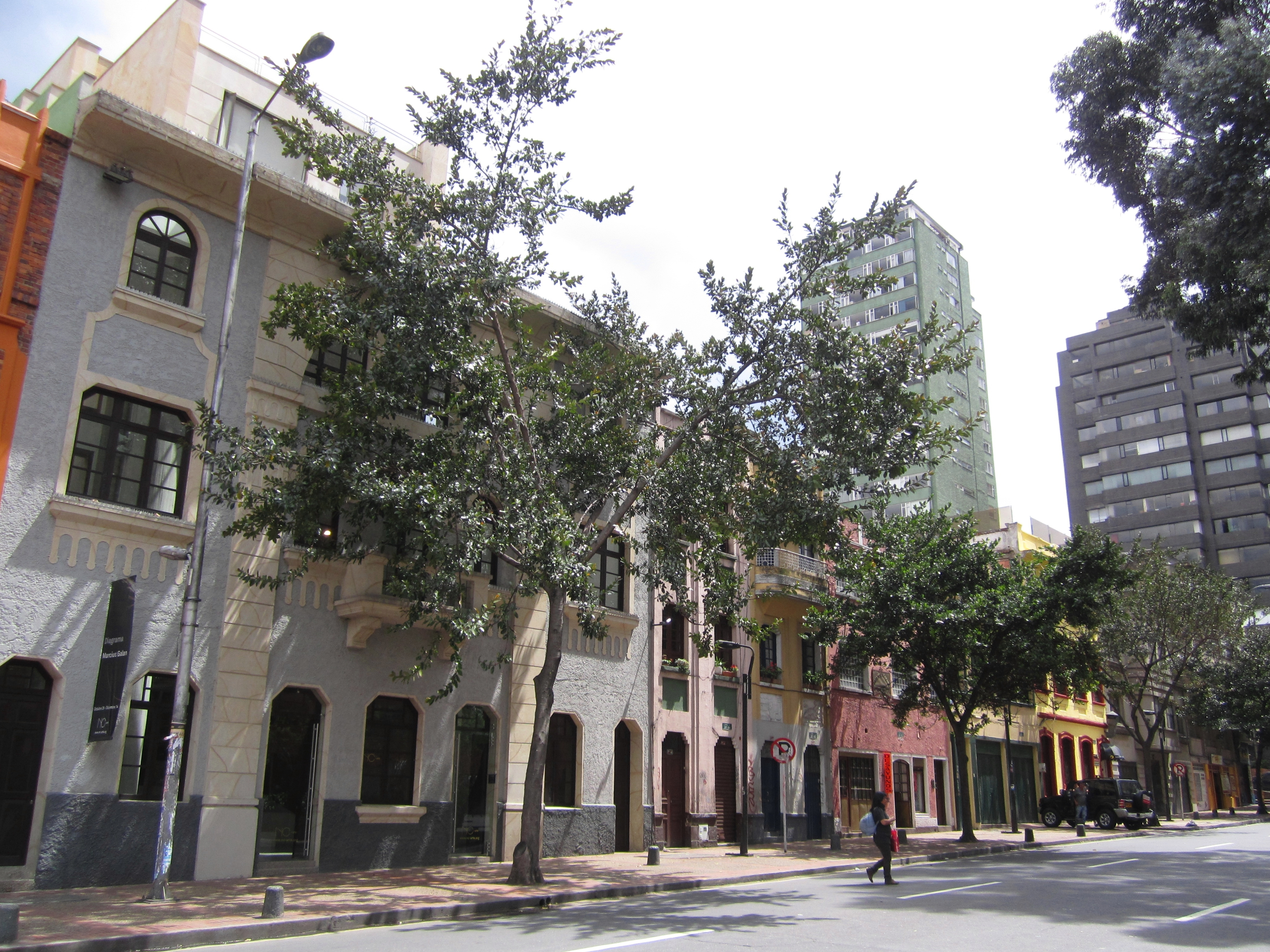 Bogotá barrio La Macarena, costado oriental de la carrera 5 con calle 26 B.